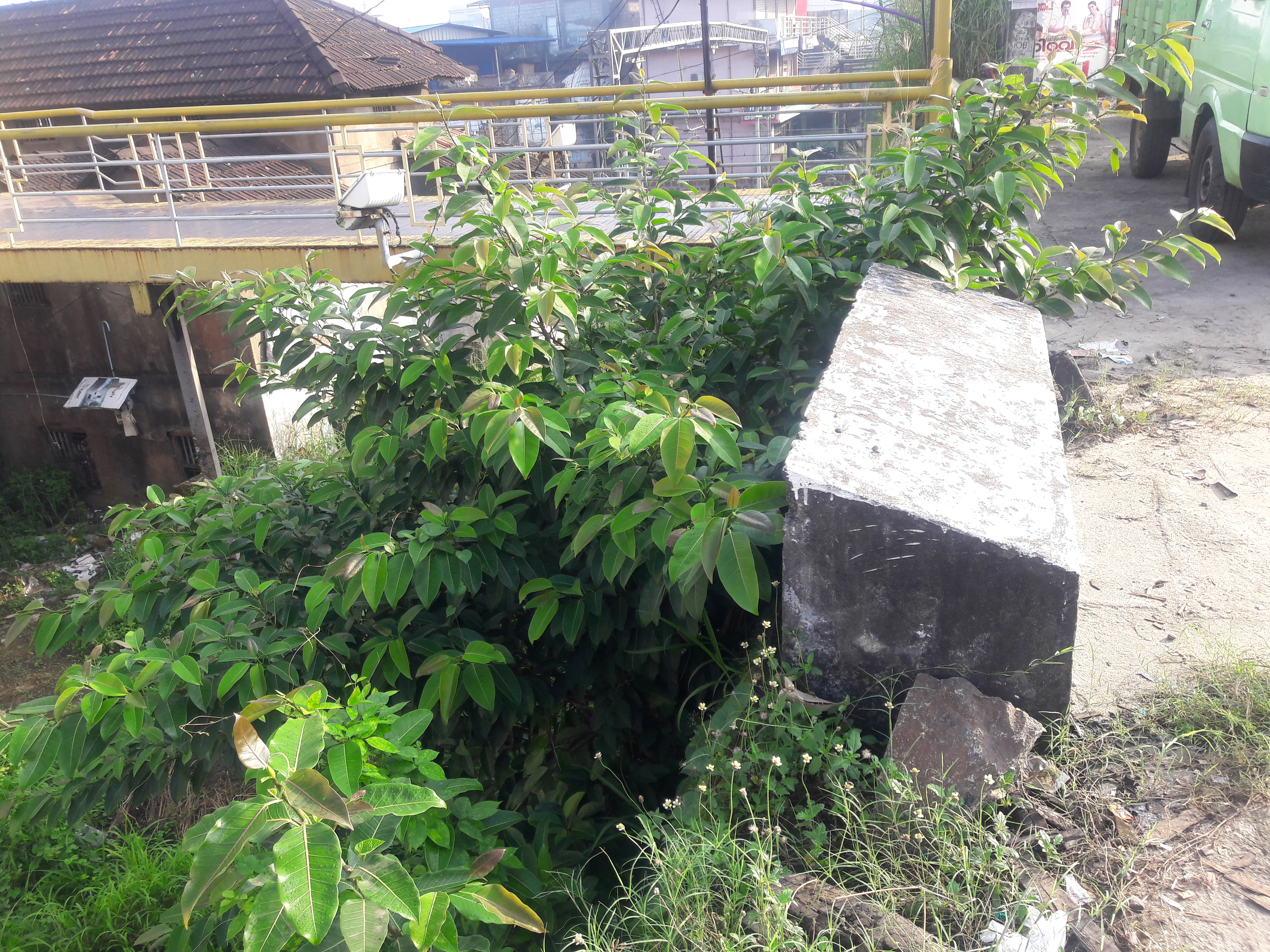 മലപ്പുറം ജില്ലയിലെ തിരൂര്‍ നഗരത്തില്‍ ഒരു പാലത്തിന്‍റെ വിടവില്‍ വളരുന്ന ഒരു ചേല മരം. .Indian Bat tree, Indian Bat fig ശാസ്ത്രീയ നാമം Ficus amplissima കുടുംബം Moraceae.